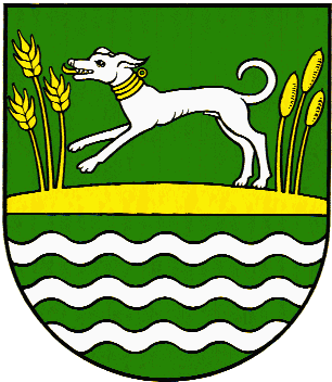 Erb obce Potok